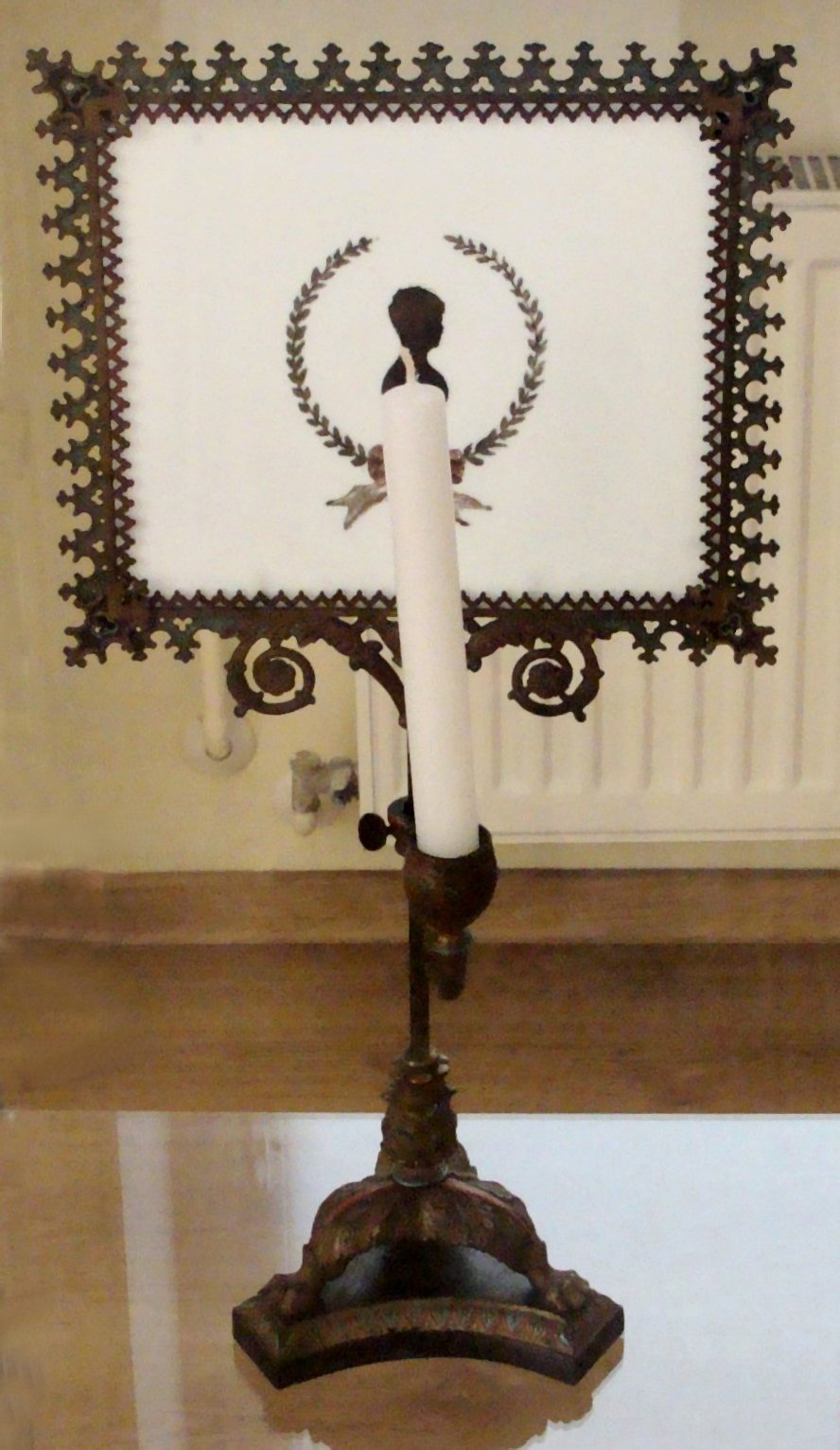 Świecznik ze stojakiem na litofan tak zwany ombrant emaila